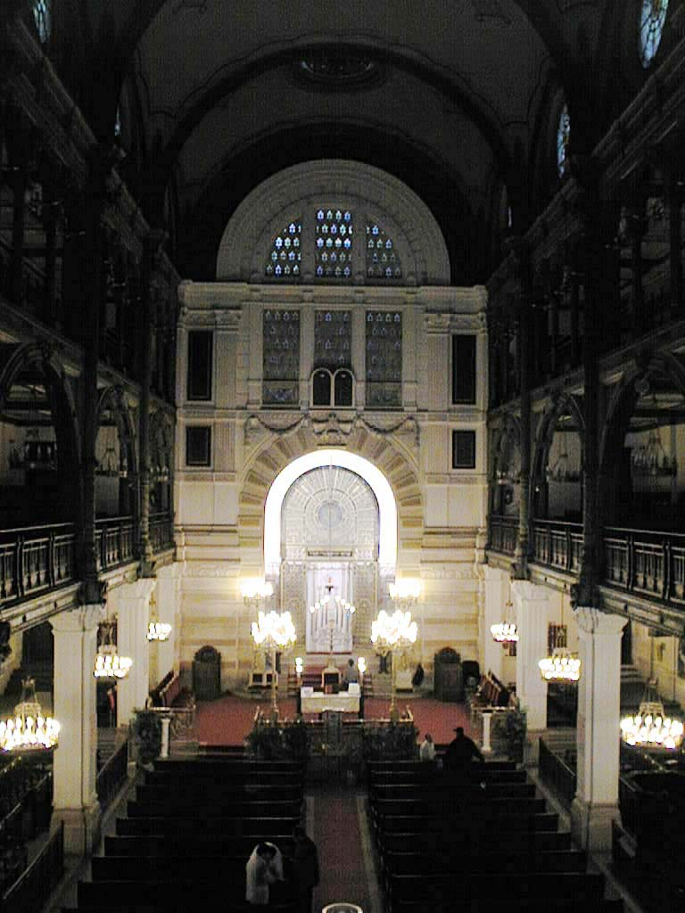 Intérieur de la synagogue de la rue des Tournelles à Paris Auteur : User:Gandalf55 Licence : GFDL